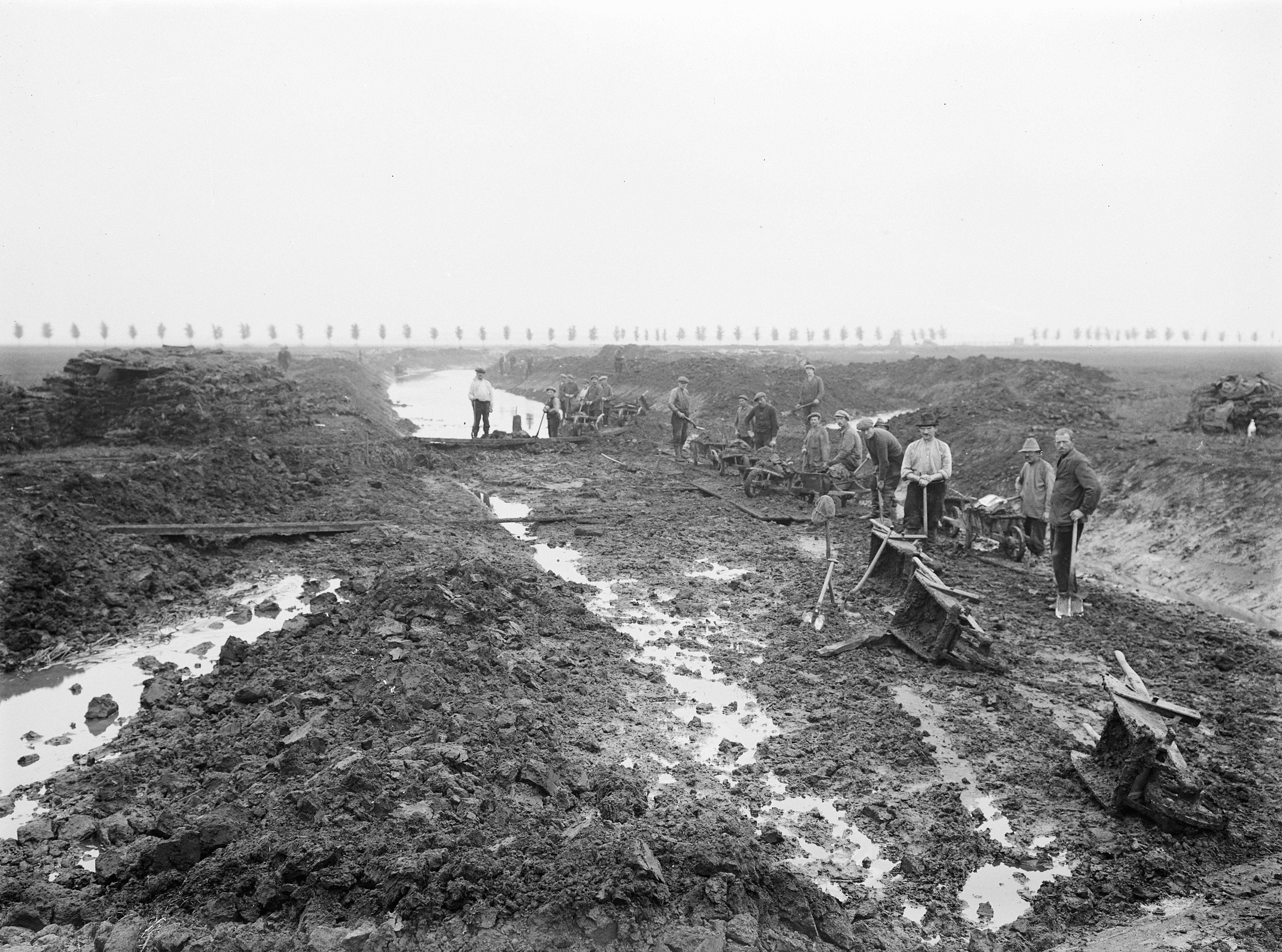 Collectie / Archief : Fotocollectie Nederlandse Heidemaatschappij Reportage / Serie : [ onbekend ] Beschrijving : kanalenverbetering , drostendiep Datum : ongedateerd Trefwoorden : kanalenverbetering Persoonsnaam : drostendiep Fotograaf : [onbekend] Auteursrechthebbende : Nationaal Archief Materiaalsoort : Glasnegatief Nummer archiefinventaris : bekijk toegang 2.24.06.02 Bestanddeelnummer : 192-0369